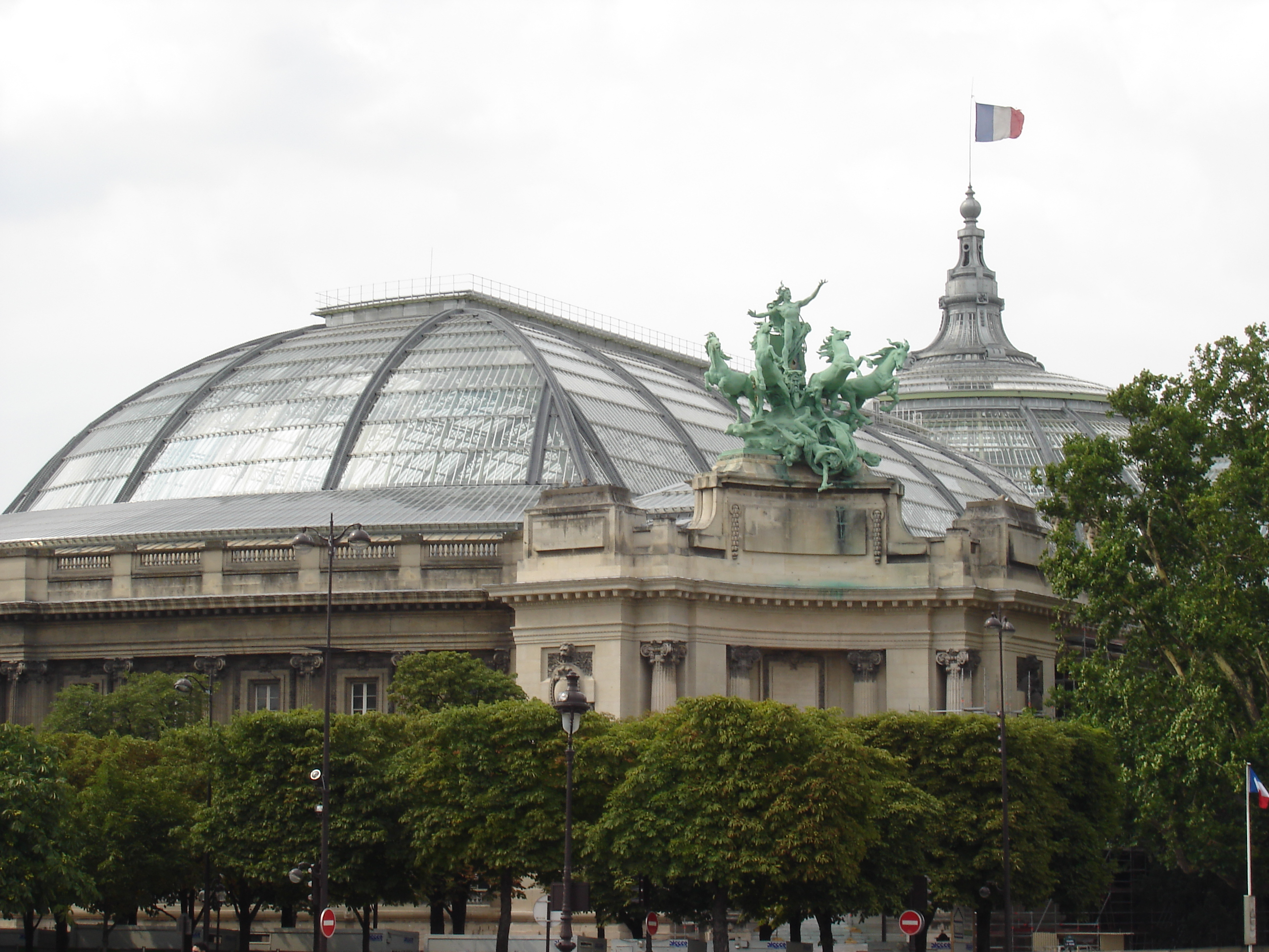 Paris